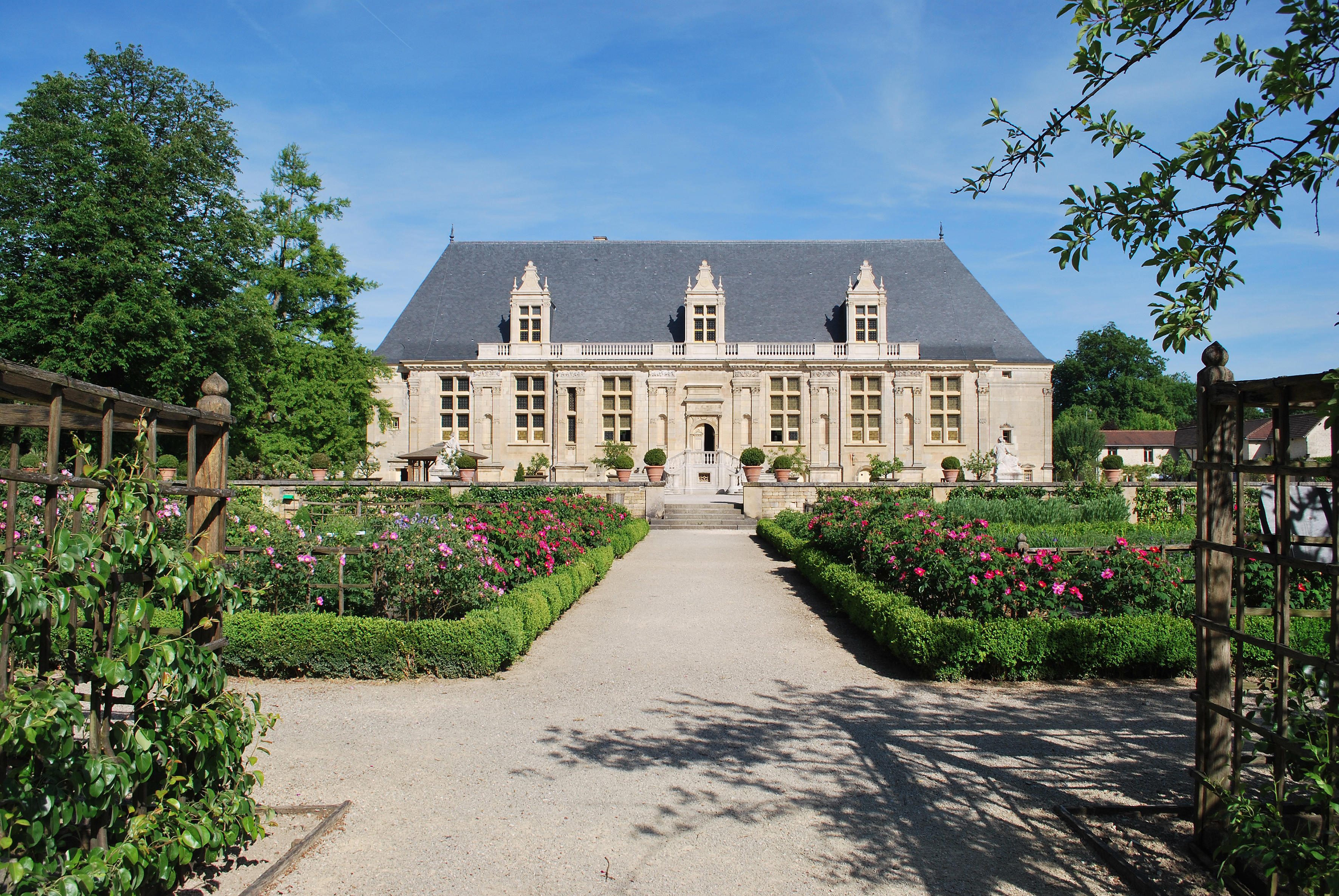 Façade Ouest du château du Grand Jardin.